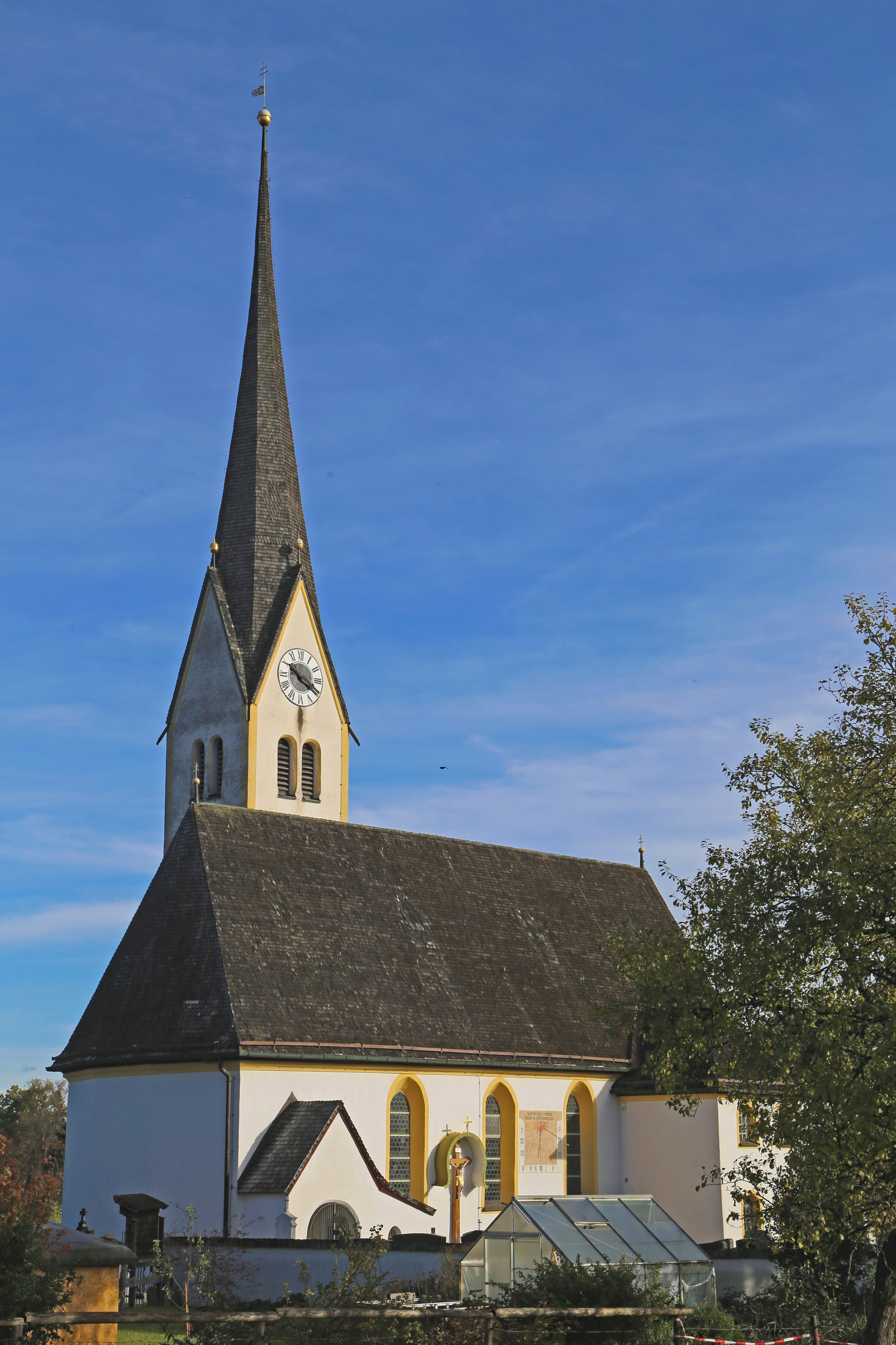 Katholische Pfarrkirche St. Agatha, Agatharied, Hausham; Spätgotischer Saalbau mit polygonalem Chor und Nordturm, 1505, um 1670 westlich erweitert und Chor barockisiert; mit Ausstattung